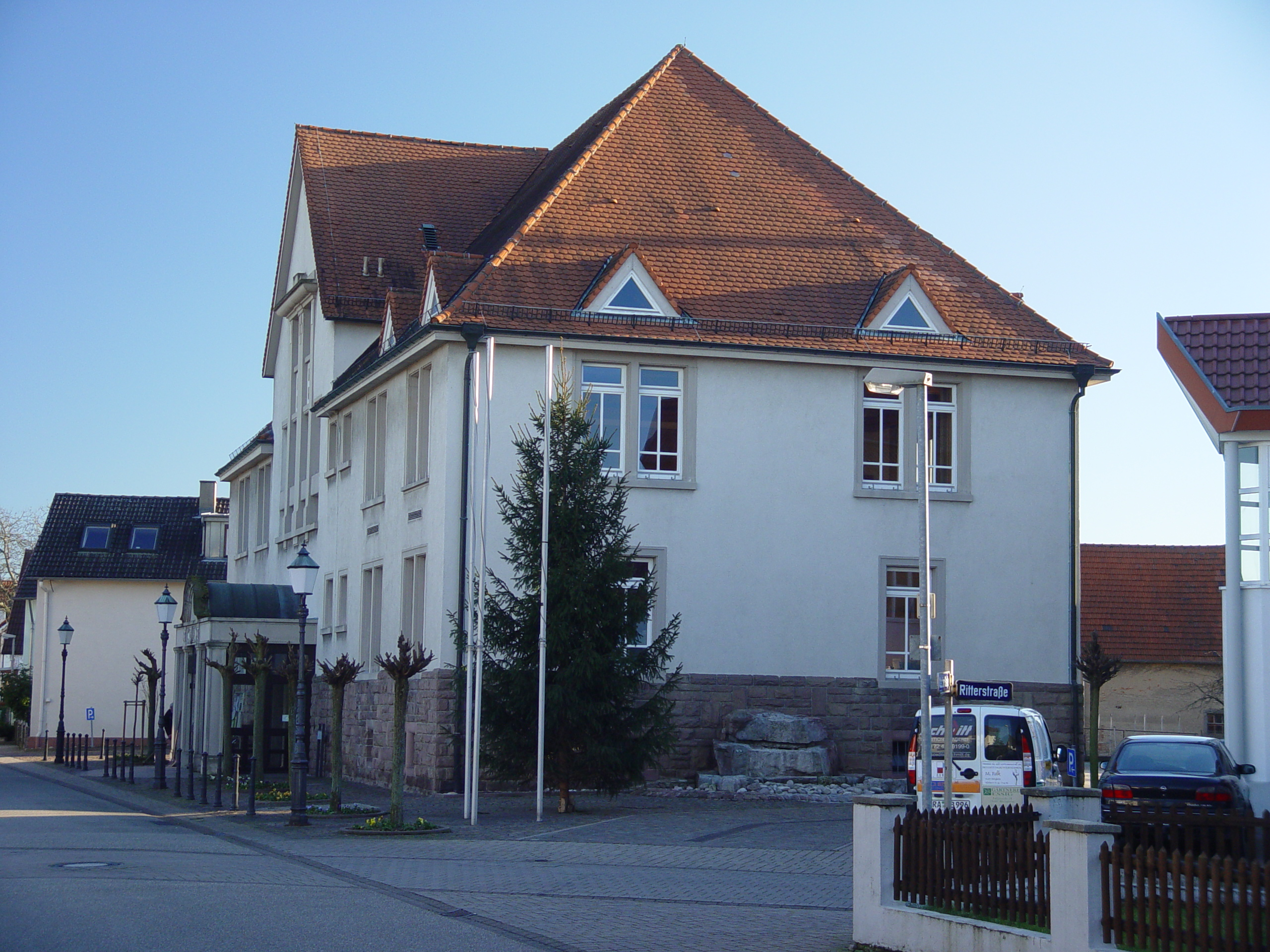 Das 1912 erbaute Bietigheimer Rathaus.